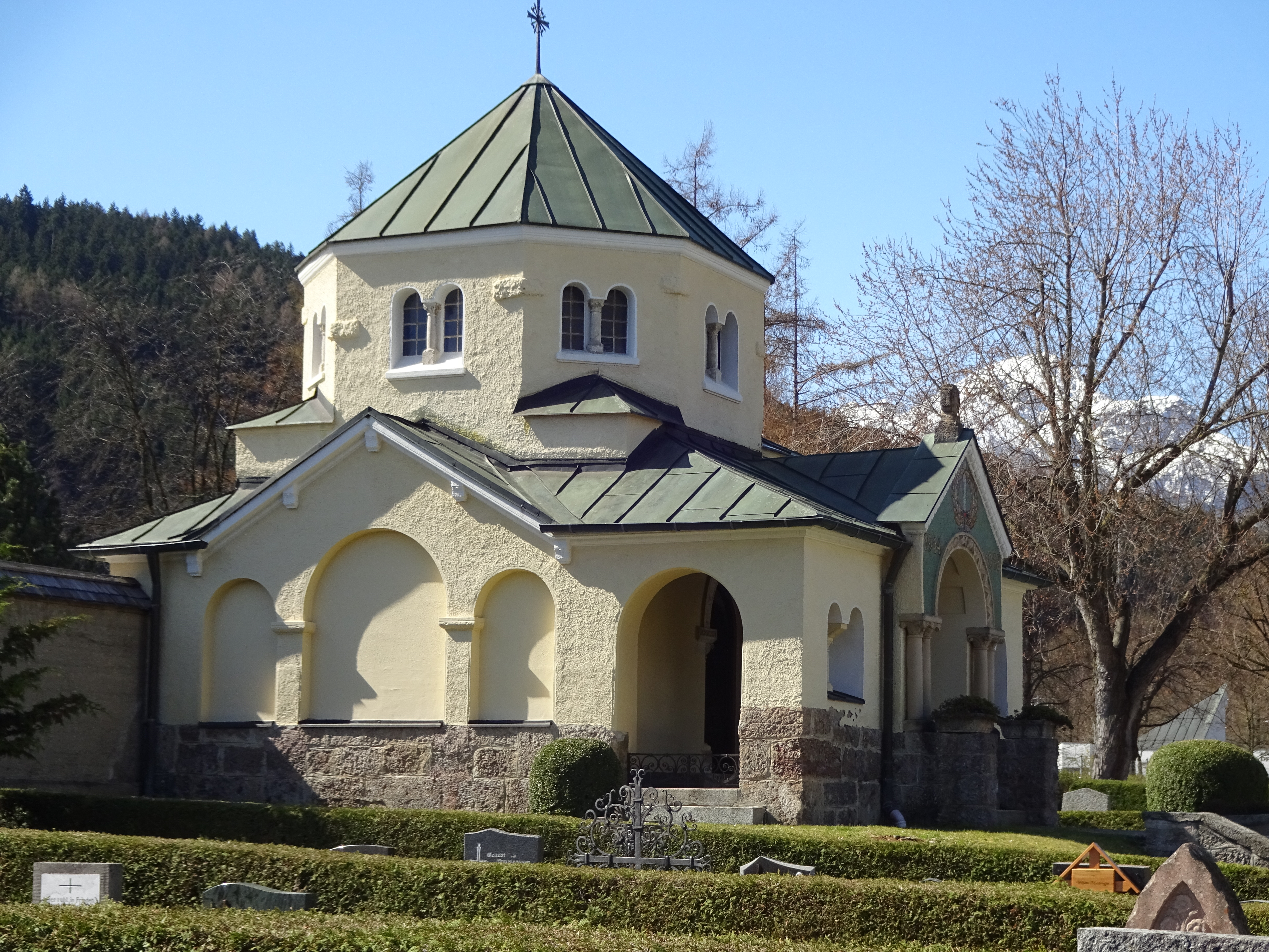 Ostfriedhof (Pradler Friedhof), Innsbruck: Kriegergedächtniskapelle This media shows the remarkable cultural object in the Austrian state of Tyrol listed by the Tyrolean Art Cadastre with the ID 72805. (on tirisMaps, pdf, more images on Commons, Wikidata)